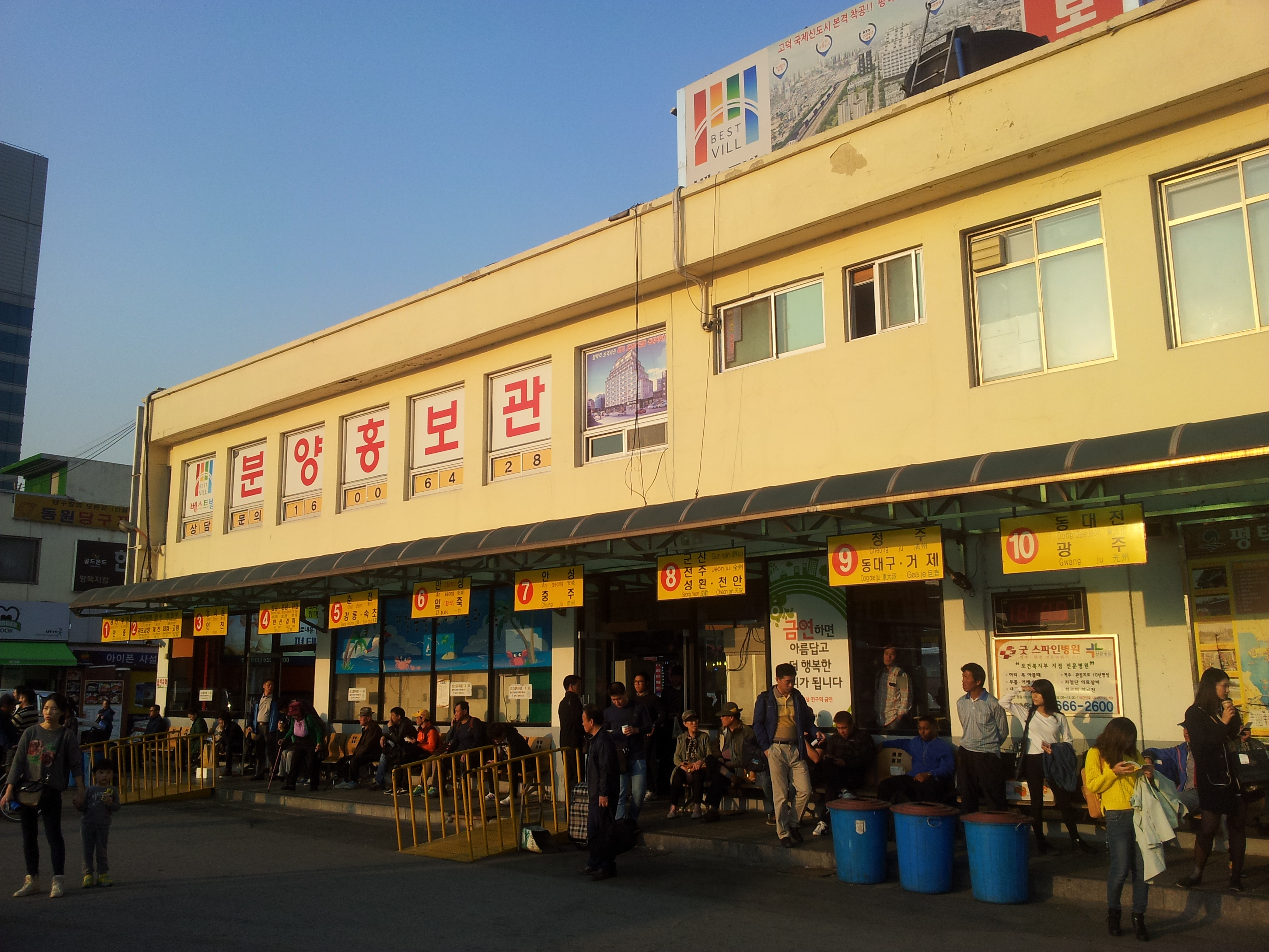 평택시외버스터미널 승차홈